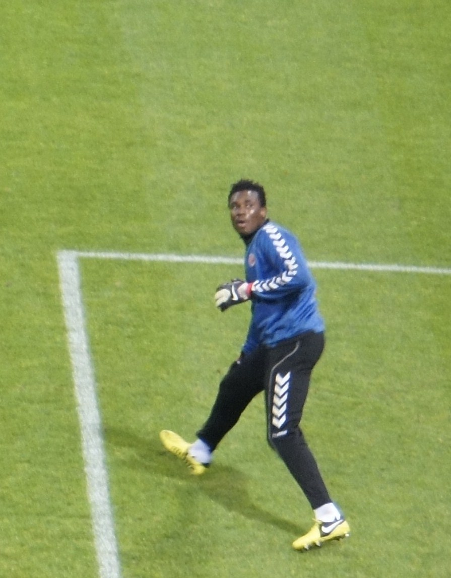 Kossi Agassa, gardien de but du Stade de Reims saison 2012/13.